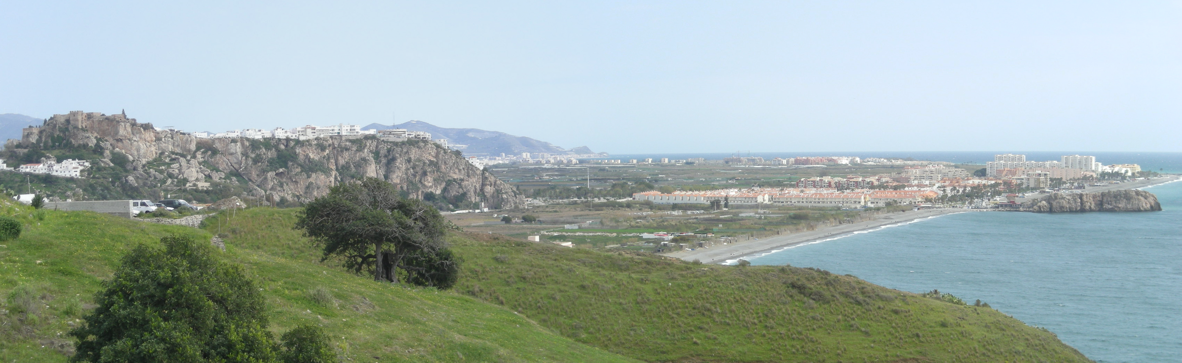 Vista de Salobreña desde Caleta-La Guardia.